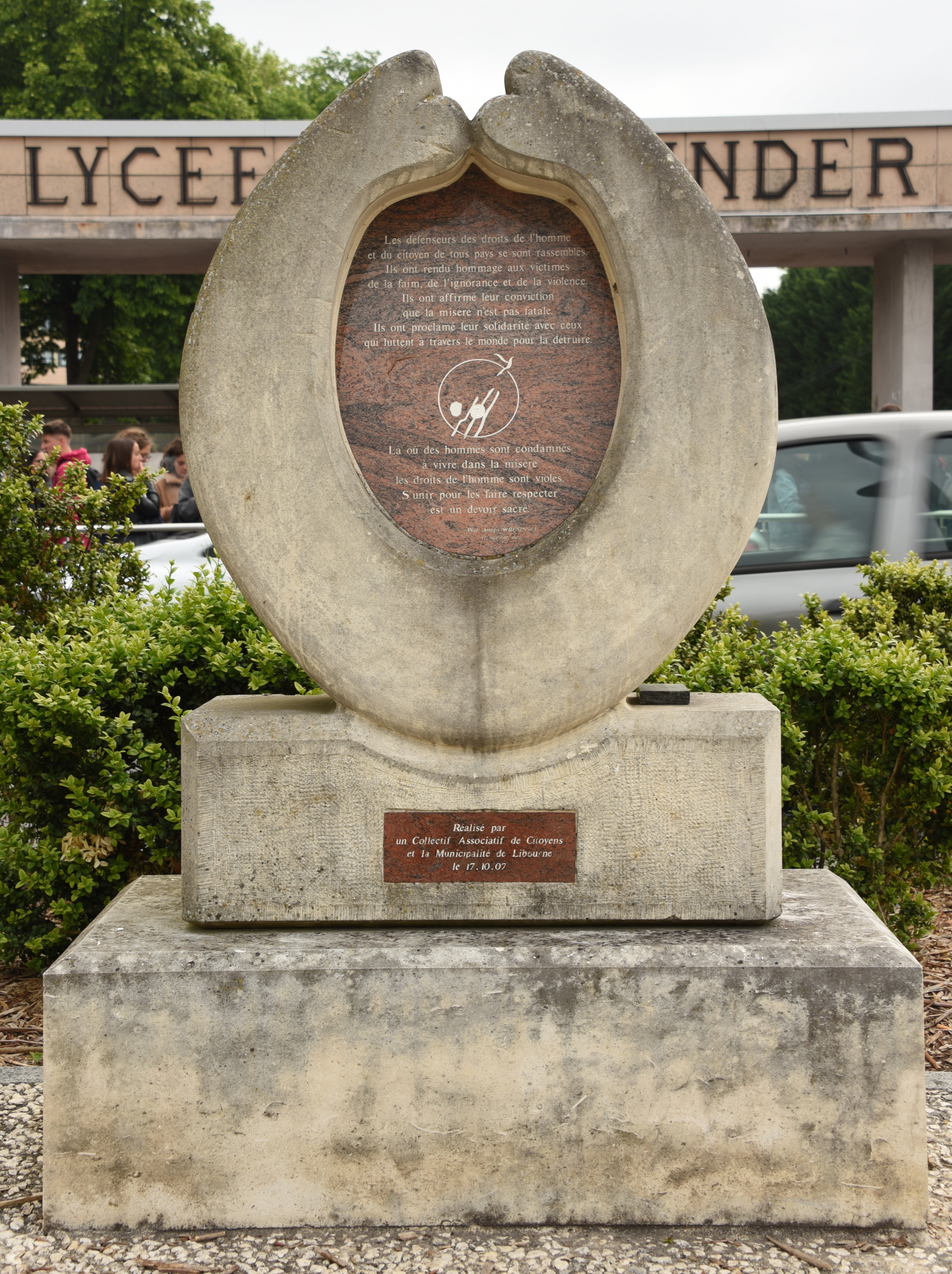 Denkmal Journée nationale de la misère - ADT